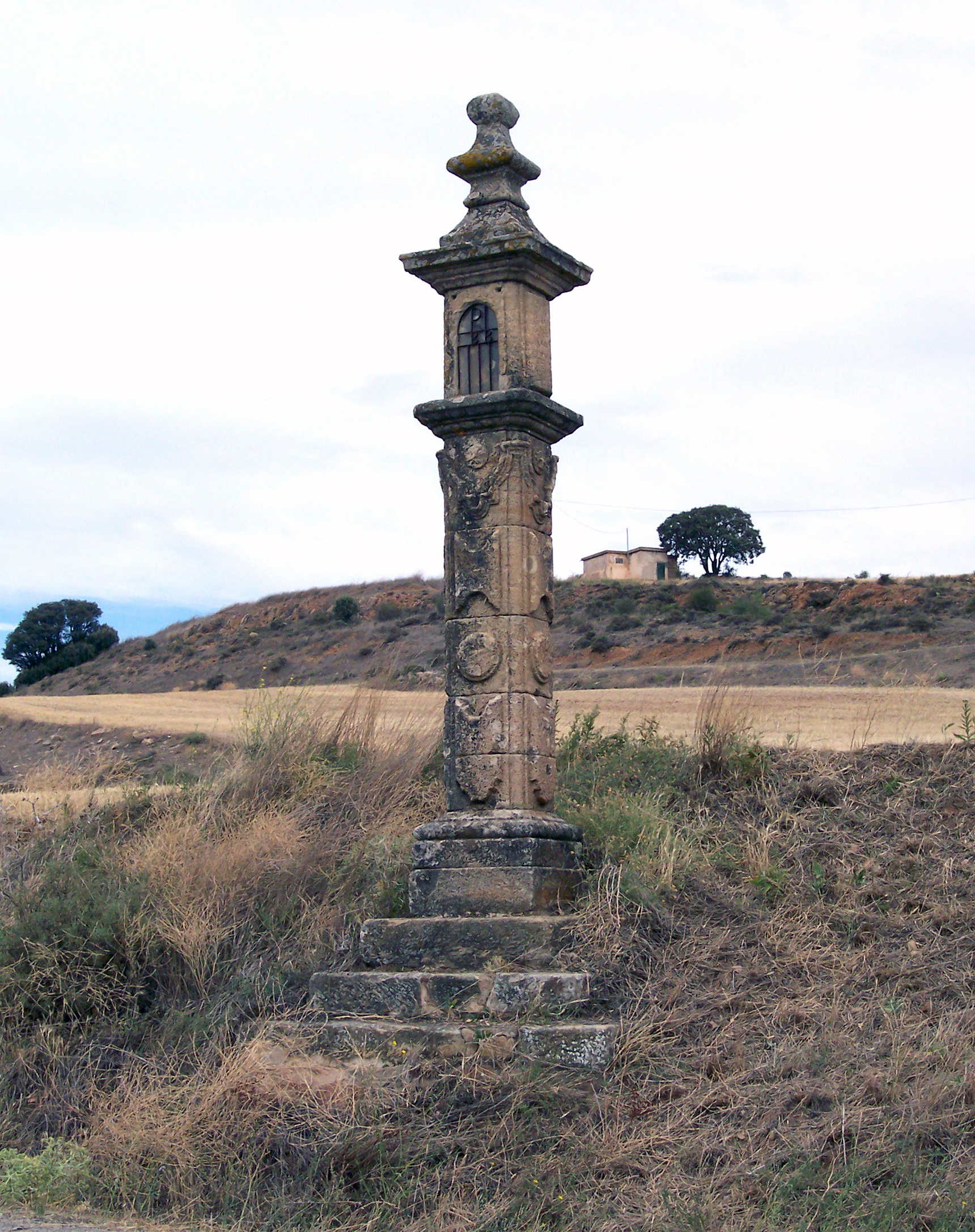 Pairón de la Virgen de la Soledad, Cubillejo del Sitio, Guadalajara, España